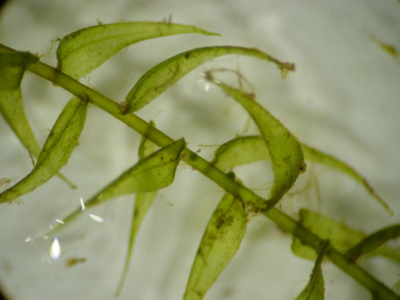 Wassermoos Drepanocladus aduncus